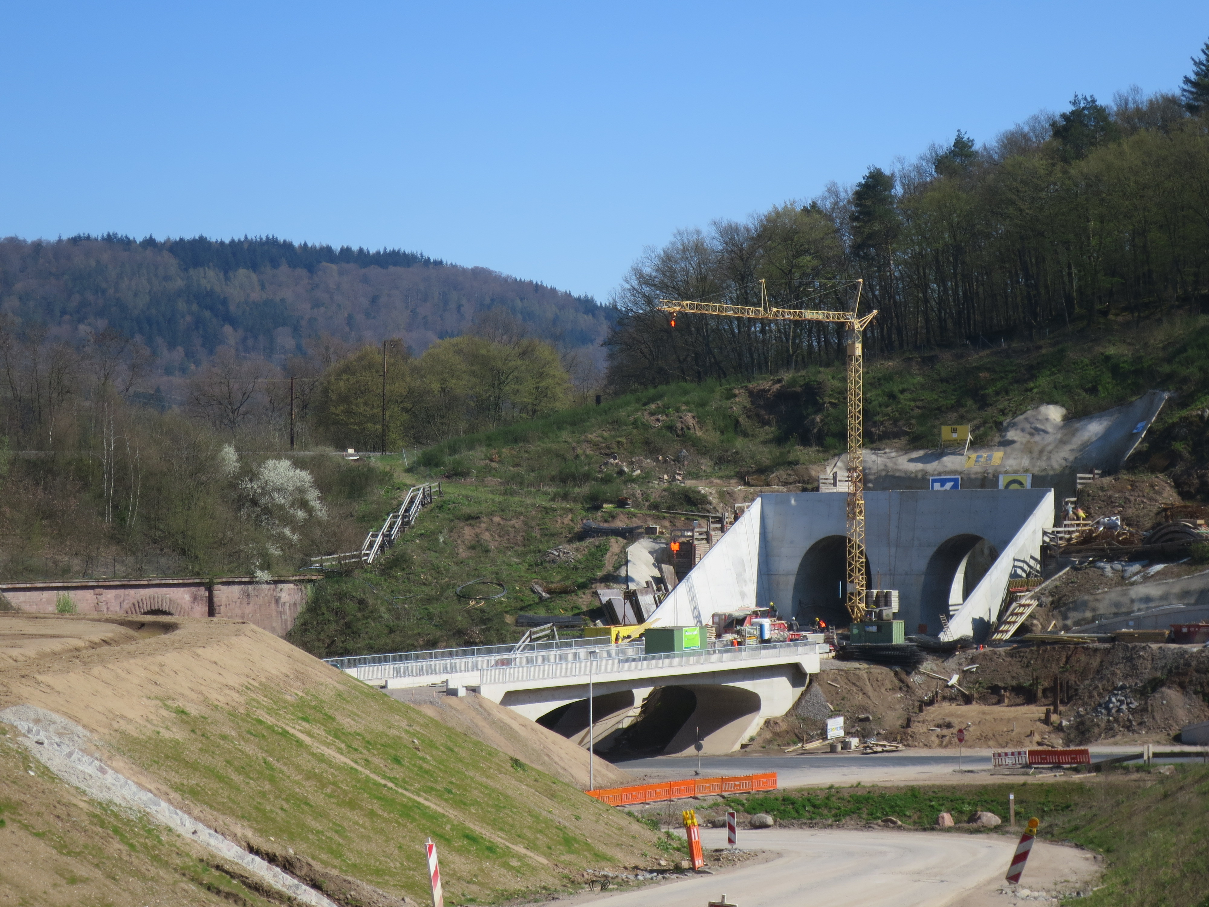 Neubaustrecke zur Umfahrung der Spessartrampe. Westportal des Metzberg-Tunnels. Links: Bestandsstrecke mit Durchlass für die heutige B 26 von 1852